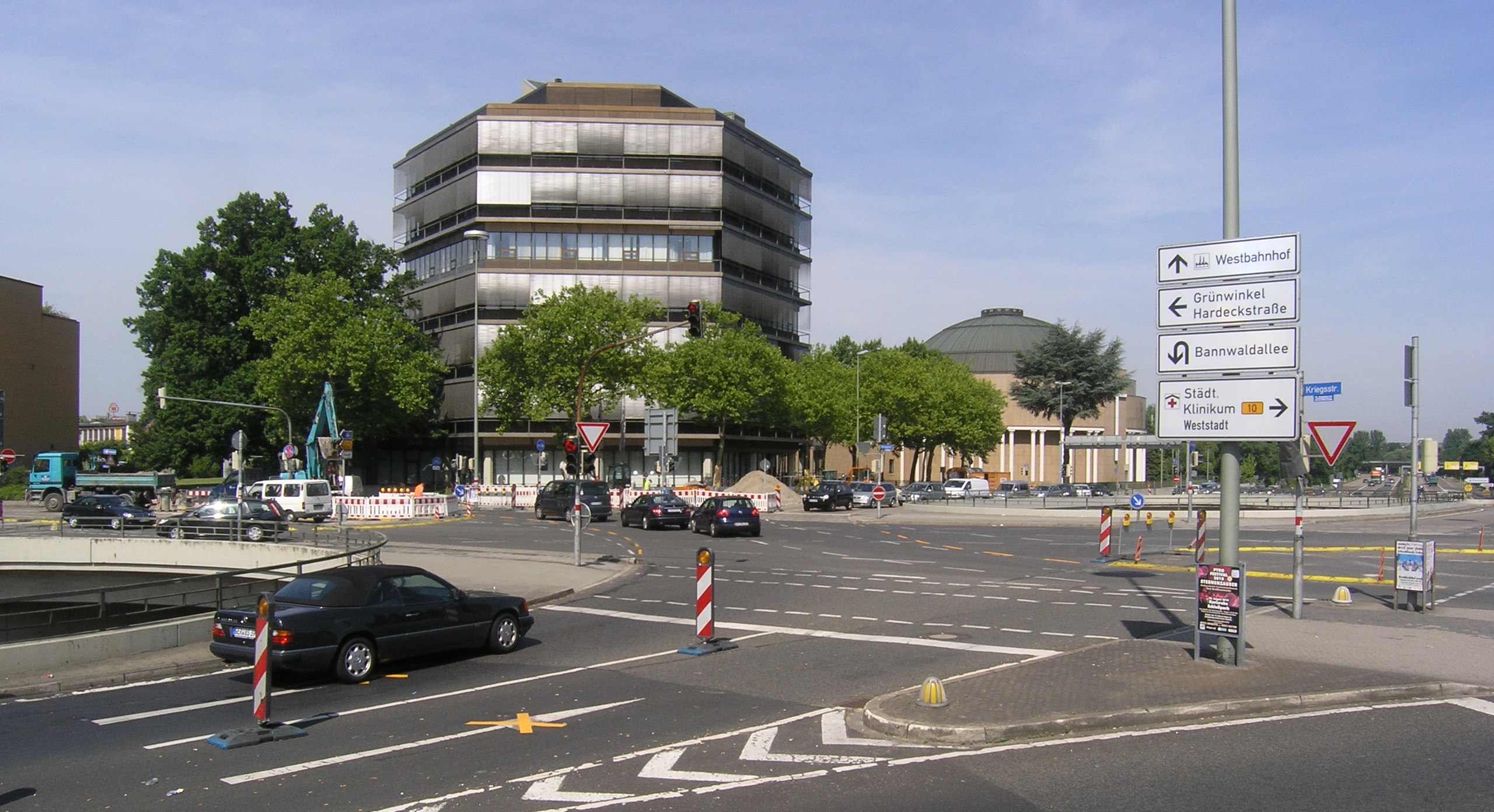 Karlsruhe-Grünwinkel, Kreuzung der Kriegsstraße mit der Südtangente beim Kühlen Krug. Die B10 biegt hier nominell ab und verläuft durch die Stadt.